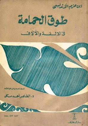 Colierul porumbitei